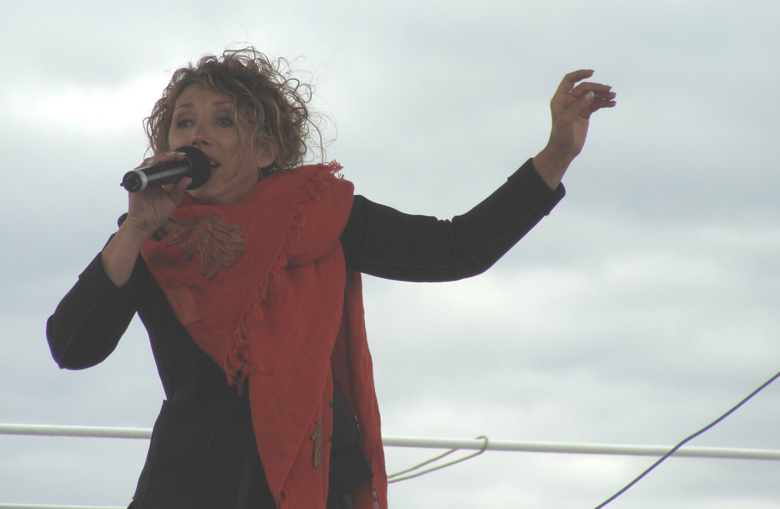 Выступление артистов телепрограммы "Аншлаг" на 425-летии города Архангельска